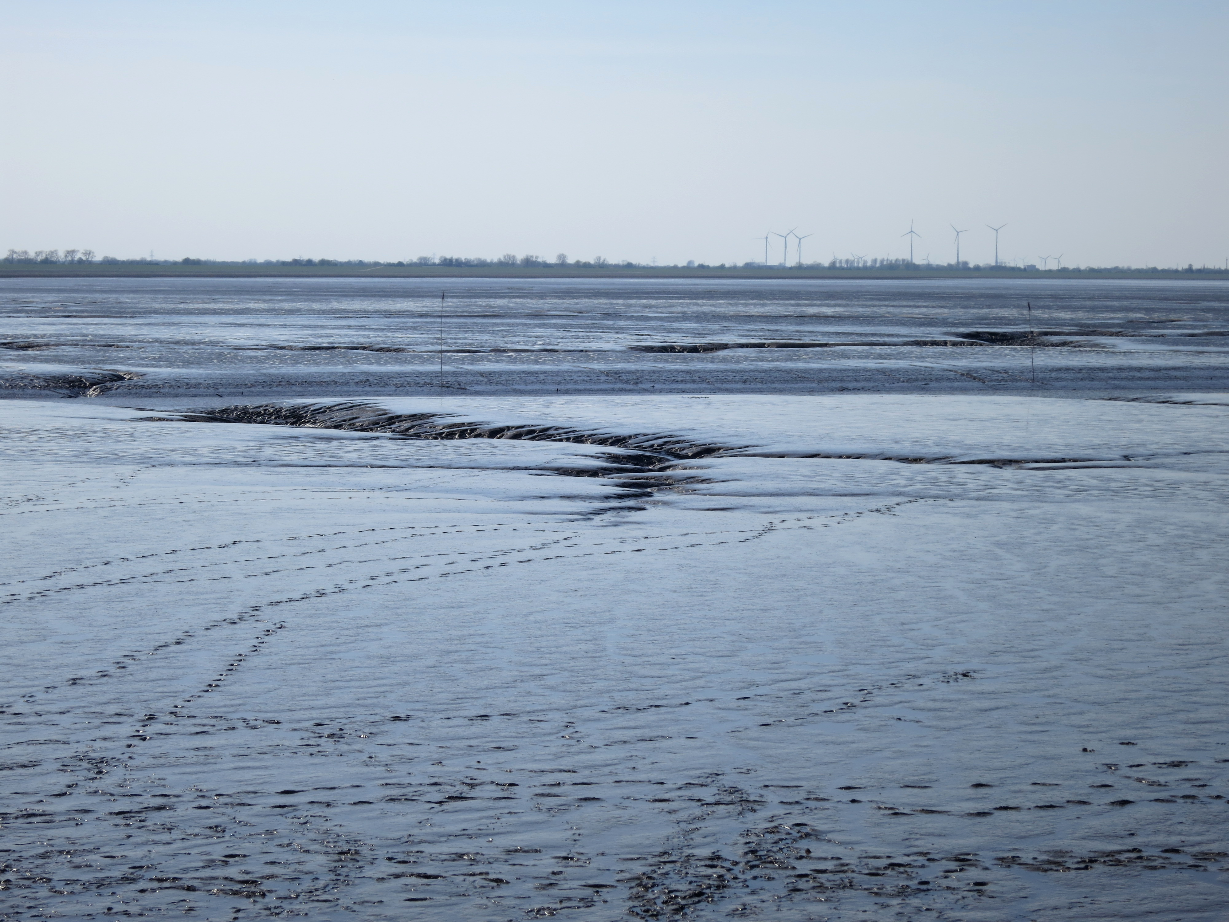 Watt vor Dangast (Jadebusen). Die Priele laufen dem Dangaster Außentief zu.